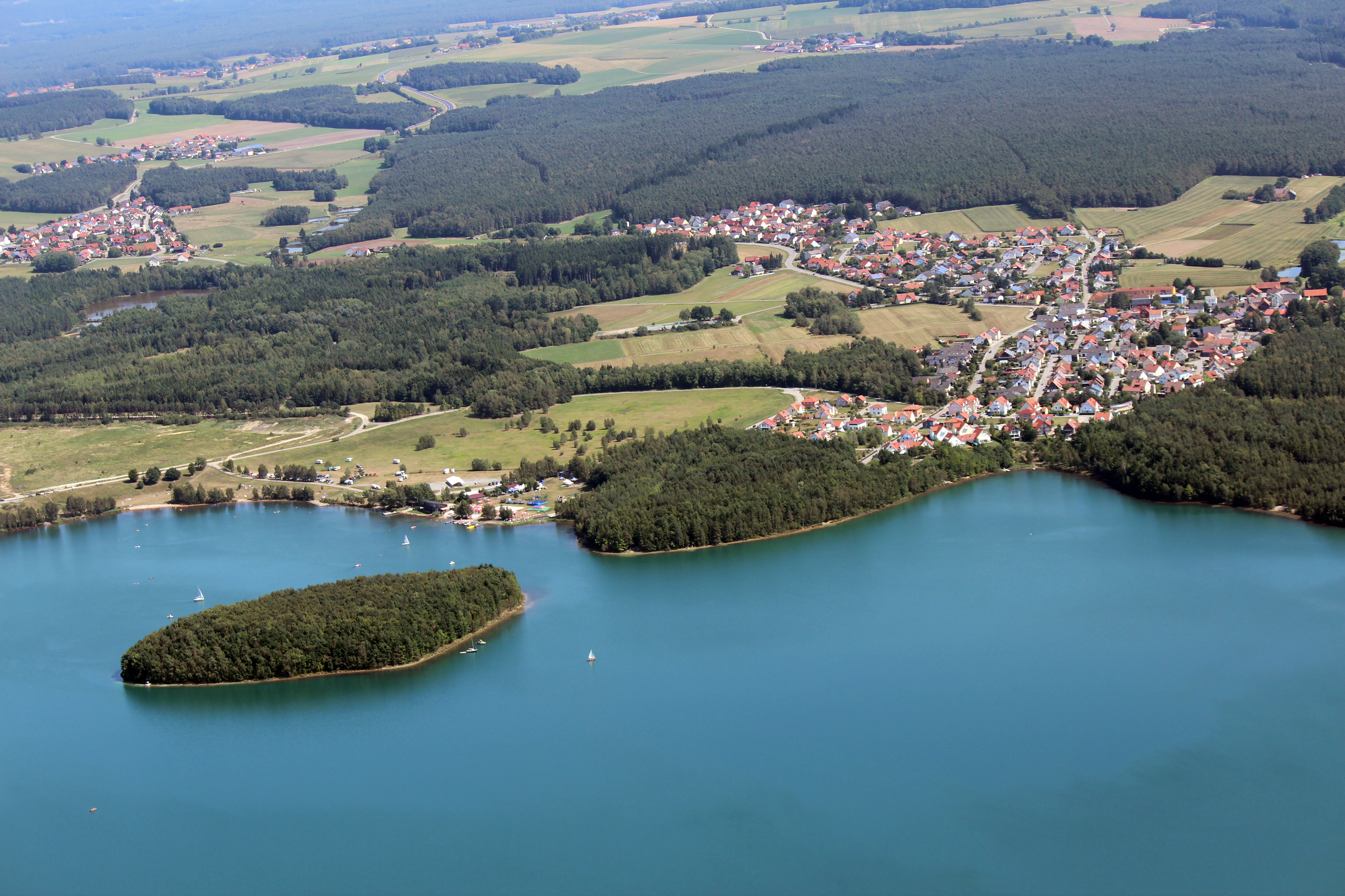 Steinberger See im Oberpfälzer Seenland, Landkreis Schwandorf, Oberpfalz Bayern (2012)